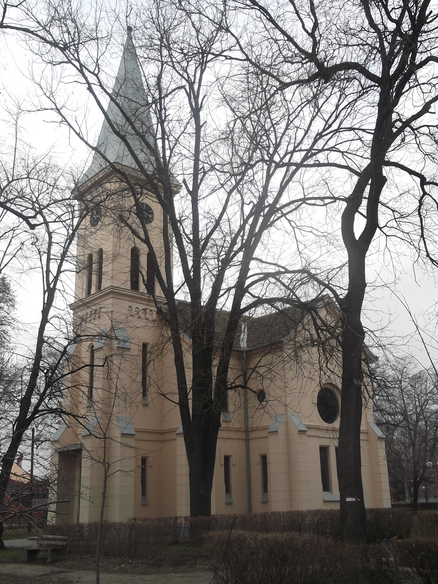 Slovacka evangelisticka crkva